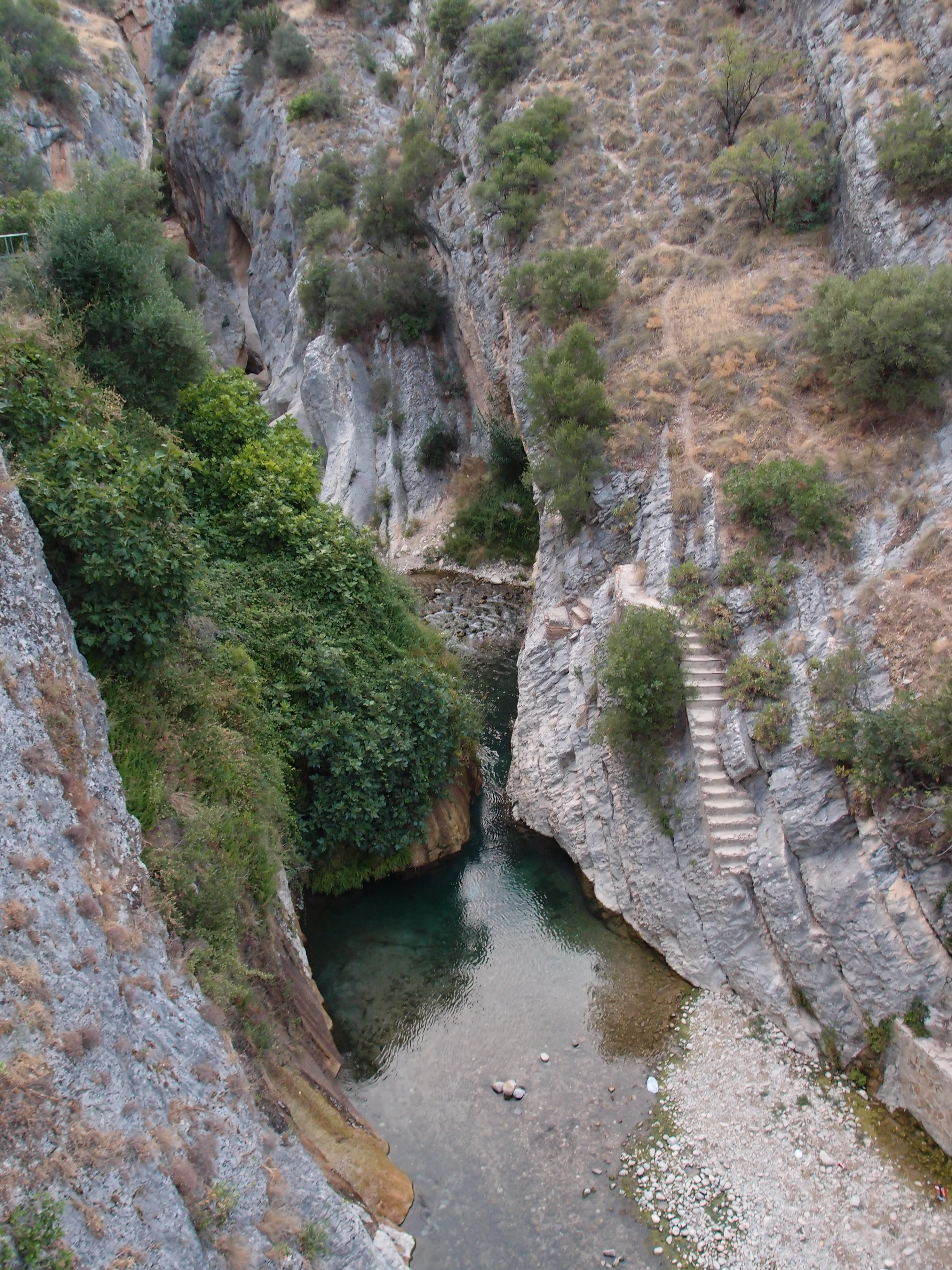 Vista de los cañones del Río Eliche.